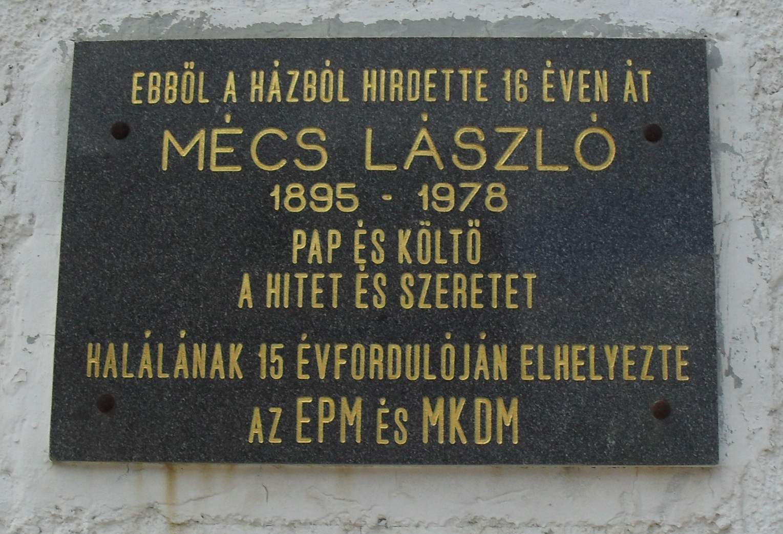 Királyhelmec - Mécs László emléktáblája